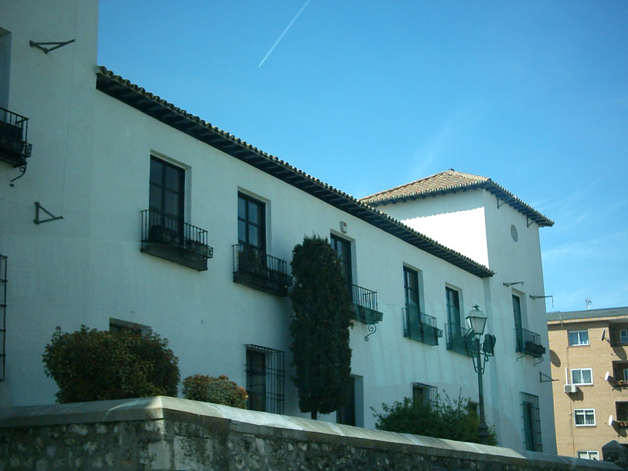 Casa del Rey